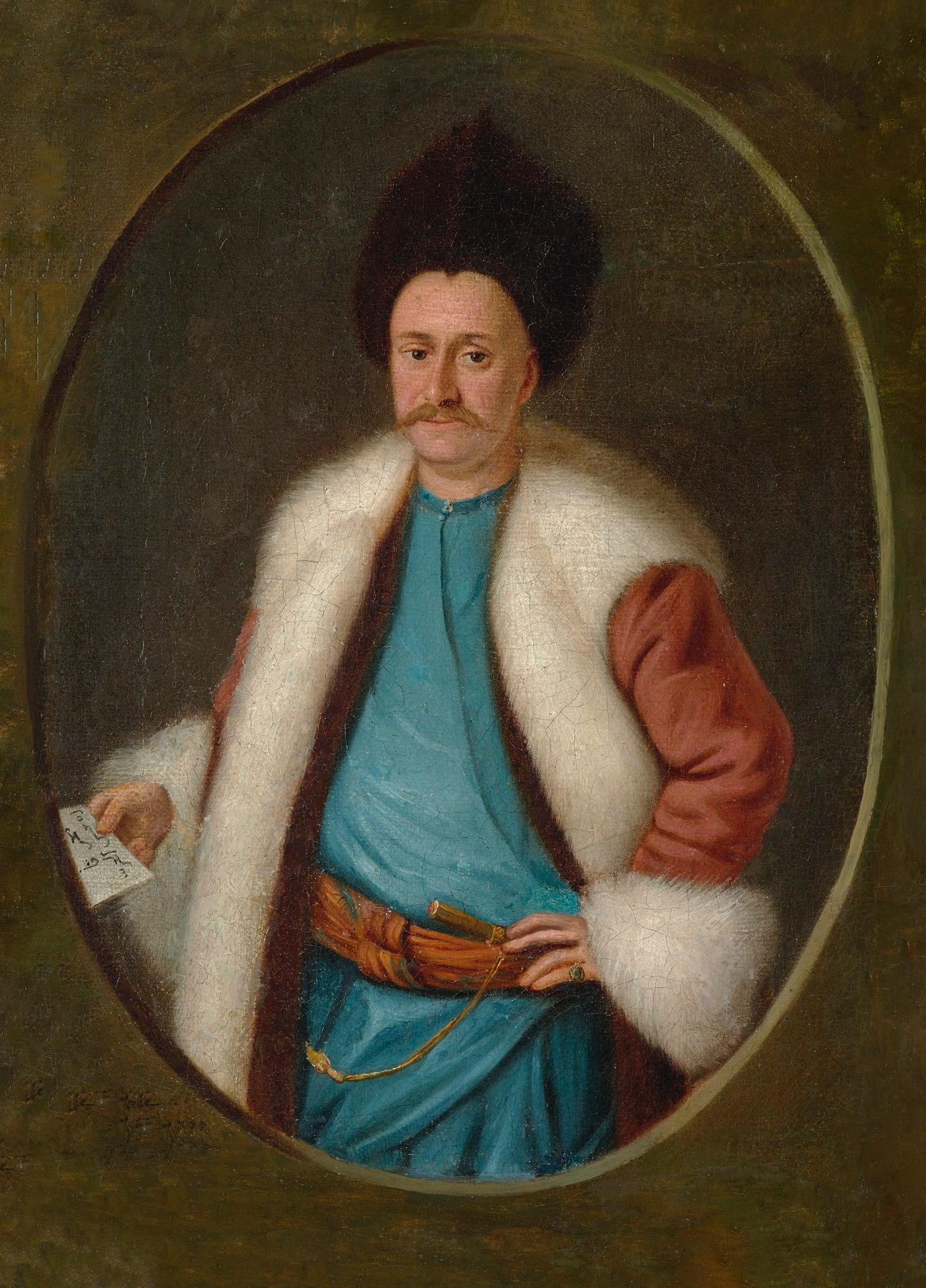 Portret Crutty Łukasz Antoni, namalowany przez Jeana-François Duchâteau (1750-ca 1796) w 1779 r.